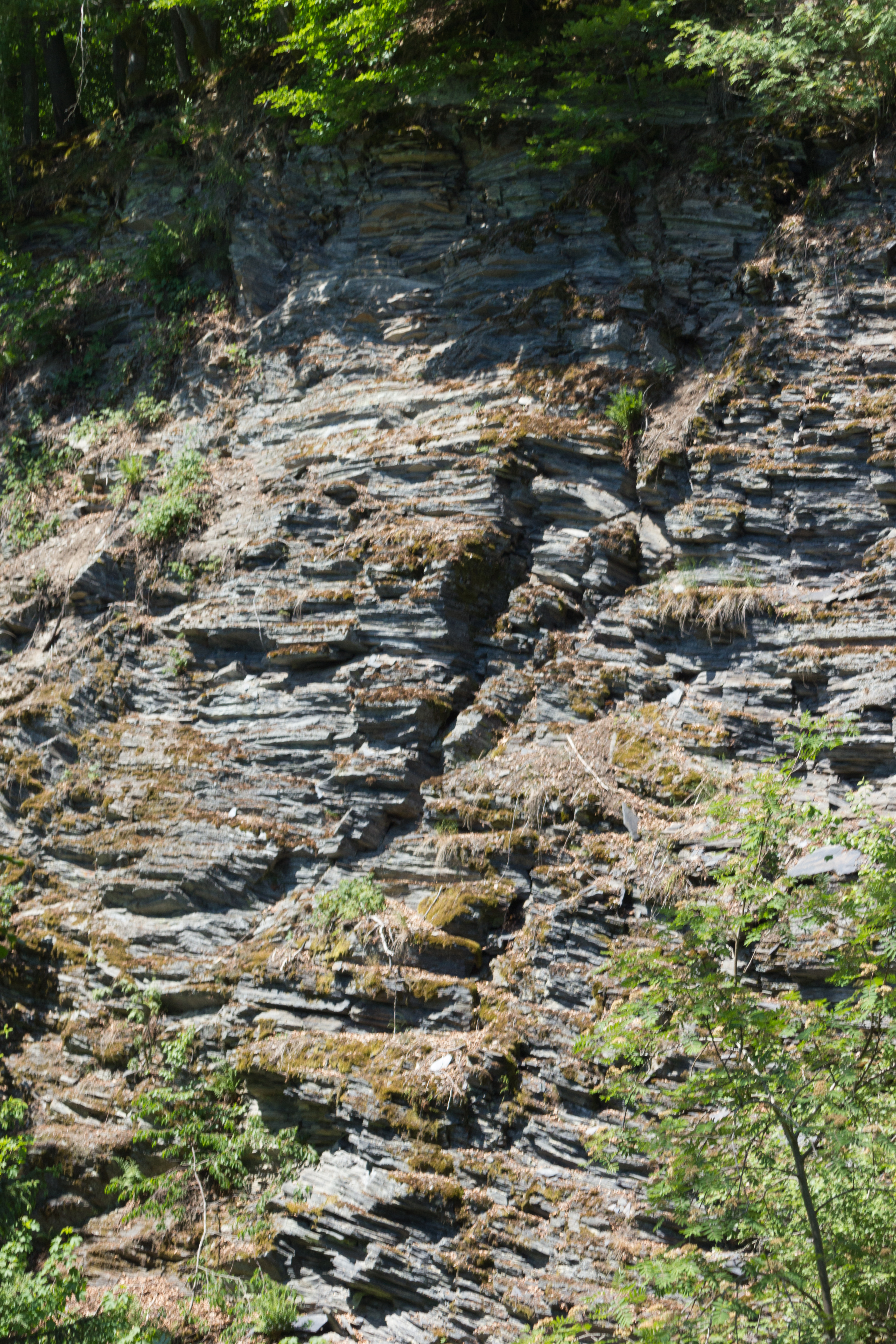 Die Dachschieferbrüche bei Dürrenwaiderhammer sind aufgelassene Steinbrüche im Landkreis Kronach in Oberfranken in Bayern und sind als Geotop (476A026) ausgewiesen